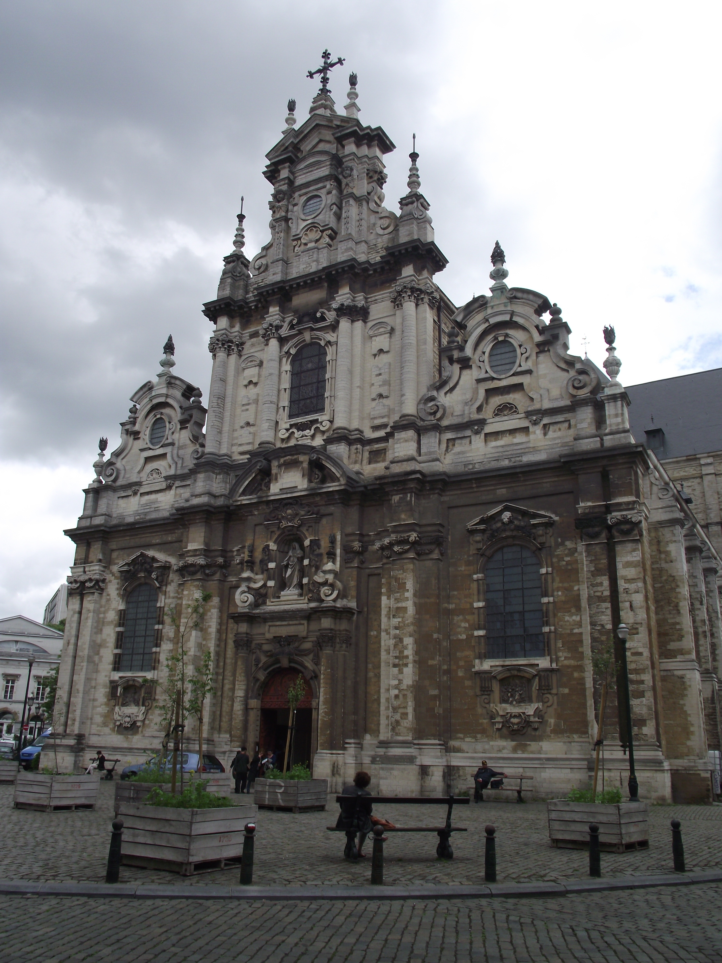 Bruxelles, Chiesa di San Giovanni Battista al Beghinaggio